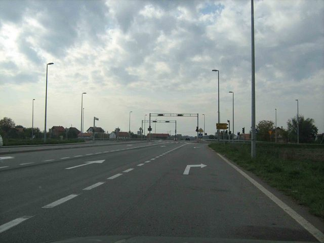 Silniční obchvat města Bijeljina, Bosna a Hercegovina